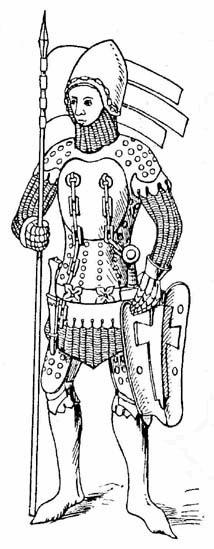 Рис. 148. Рыцарь. Деревянная скульптура в Бамбергском соборе, 1370 г.